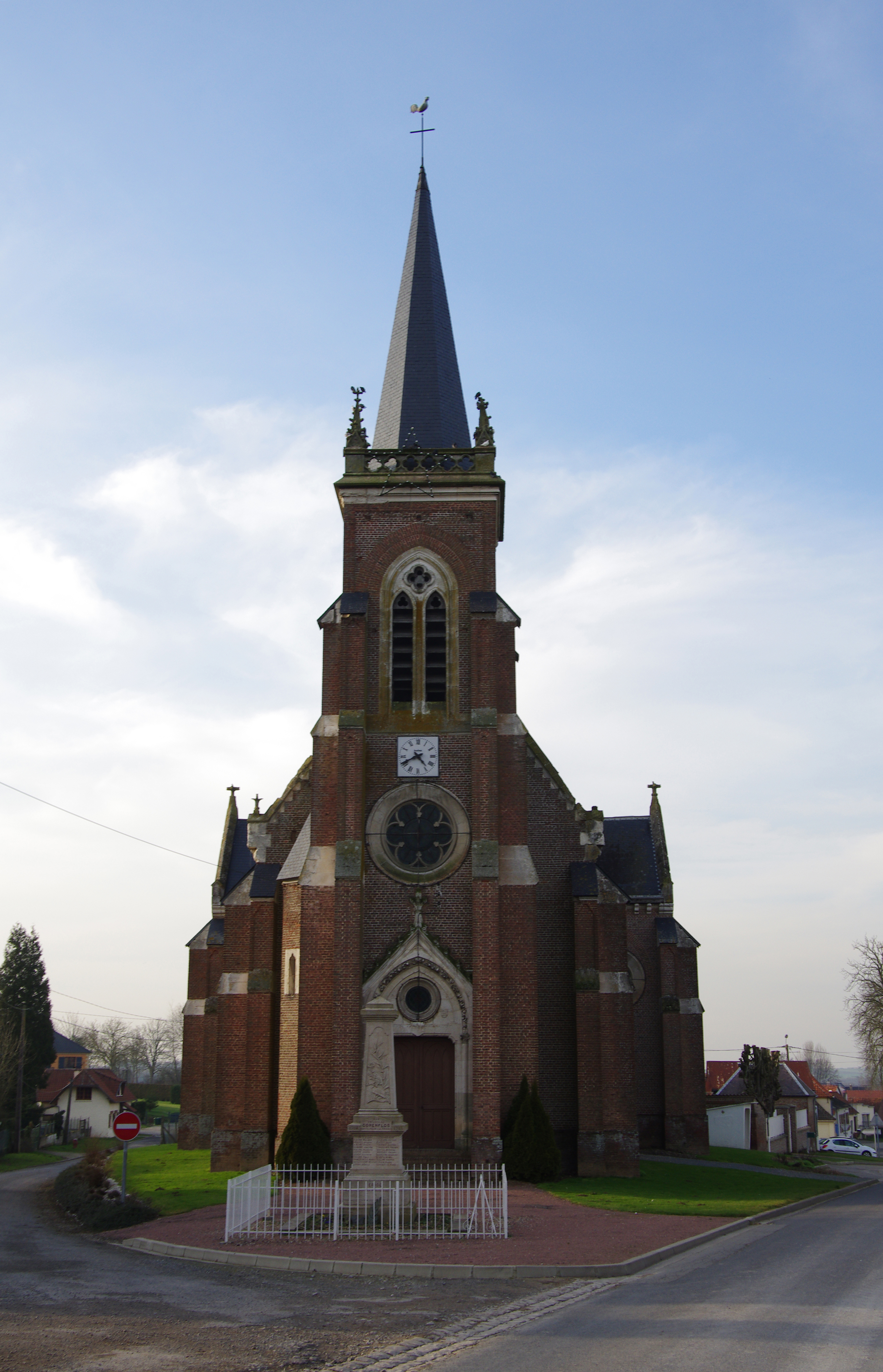 Gorenflos (Somme, France). L'église et le monument aux morts.